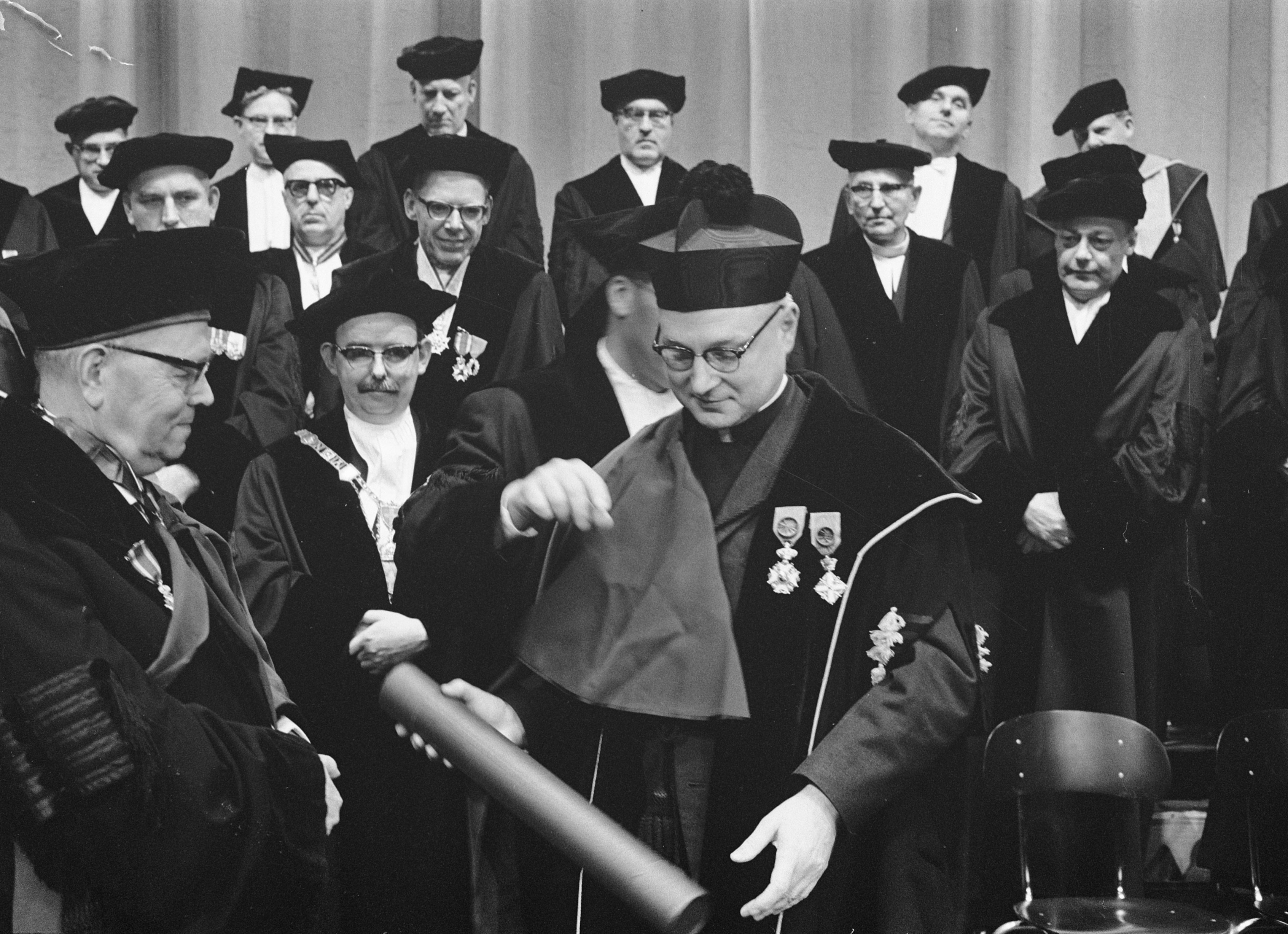 Veertigjarig bestaan van Nijmeegse universiteit twee eredoctoraten uitgereikt. De promotor professor Rogier overhandigde de bul aan Kaninnik R. Aubert /